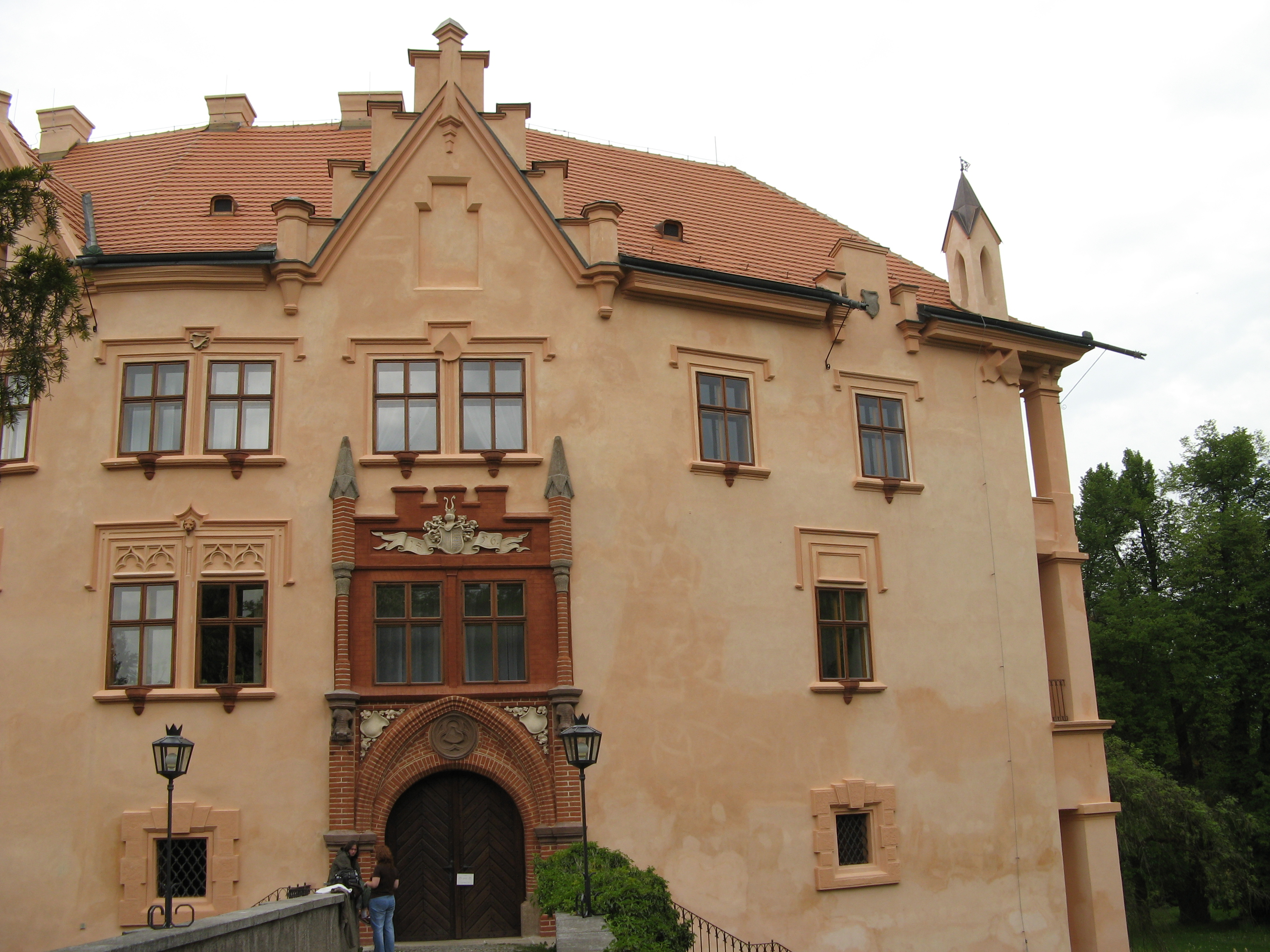 chateau Vrchotovy Janovice, Czech Republic